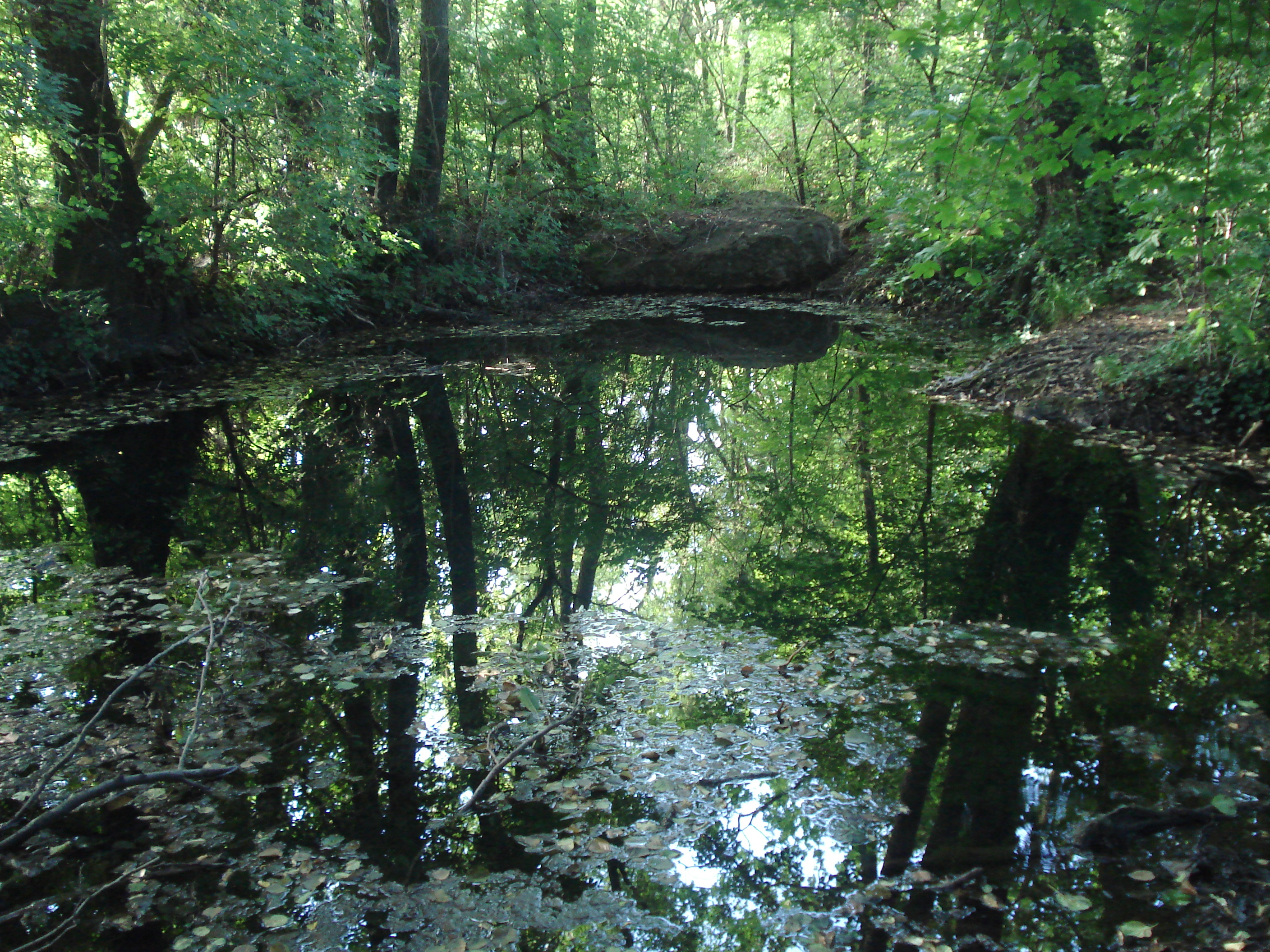 Die Eisenquelle bei Wonfurt